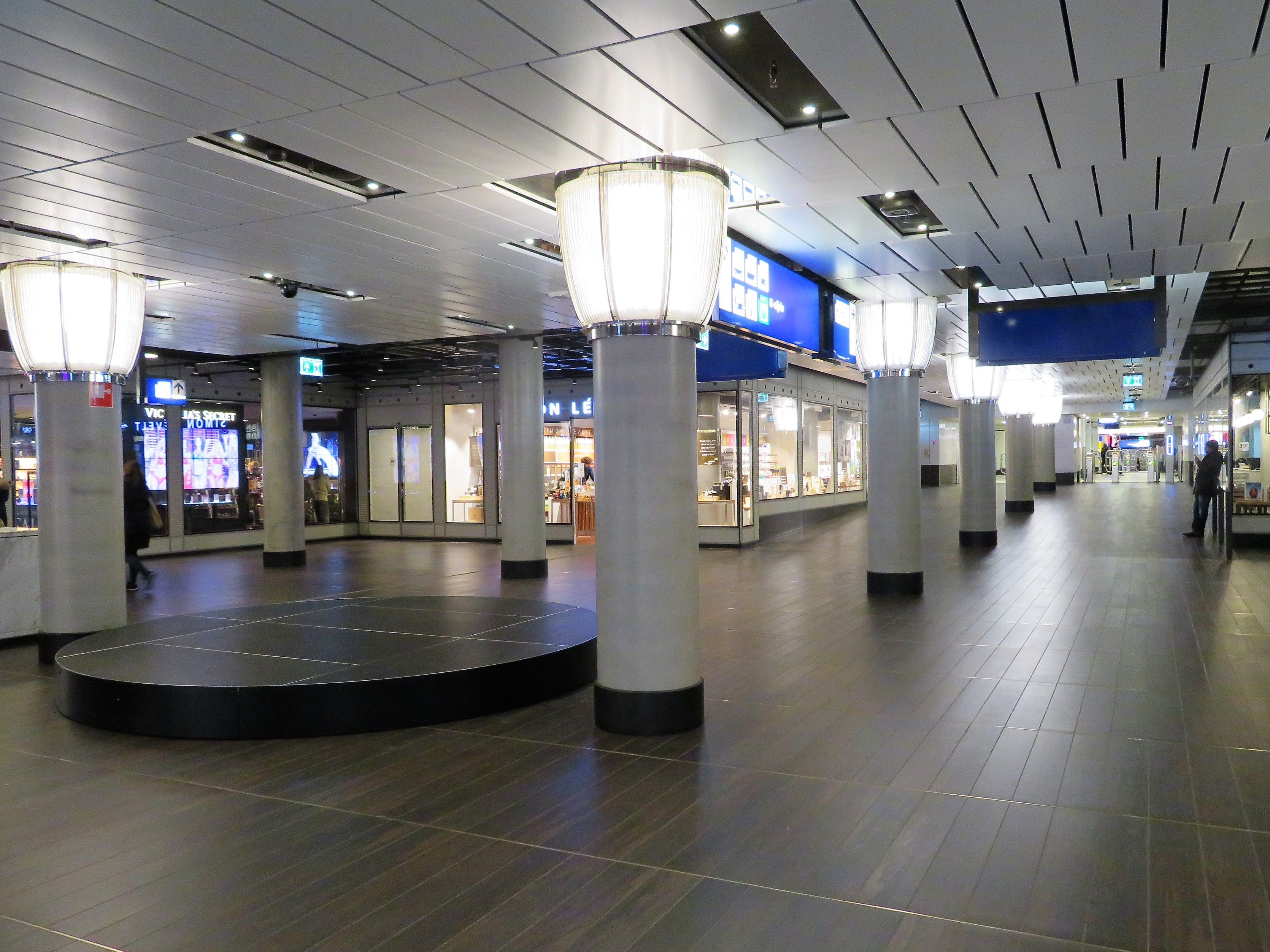 IJpassage Centraal Station Amsterdam